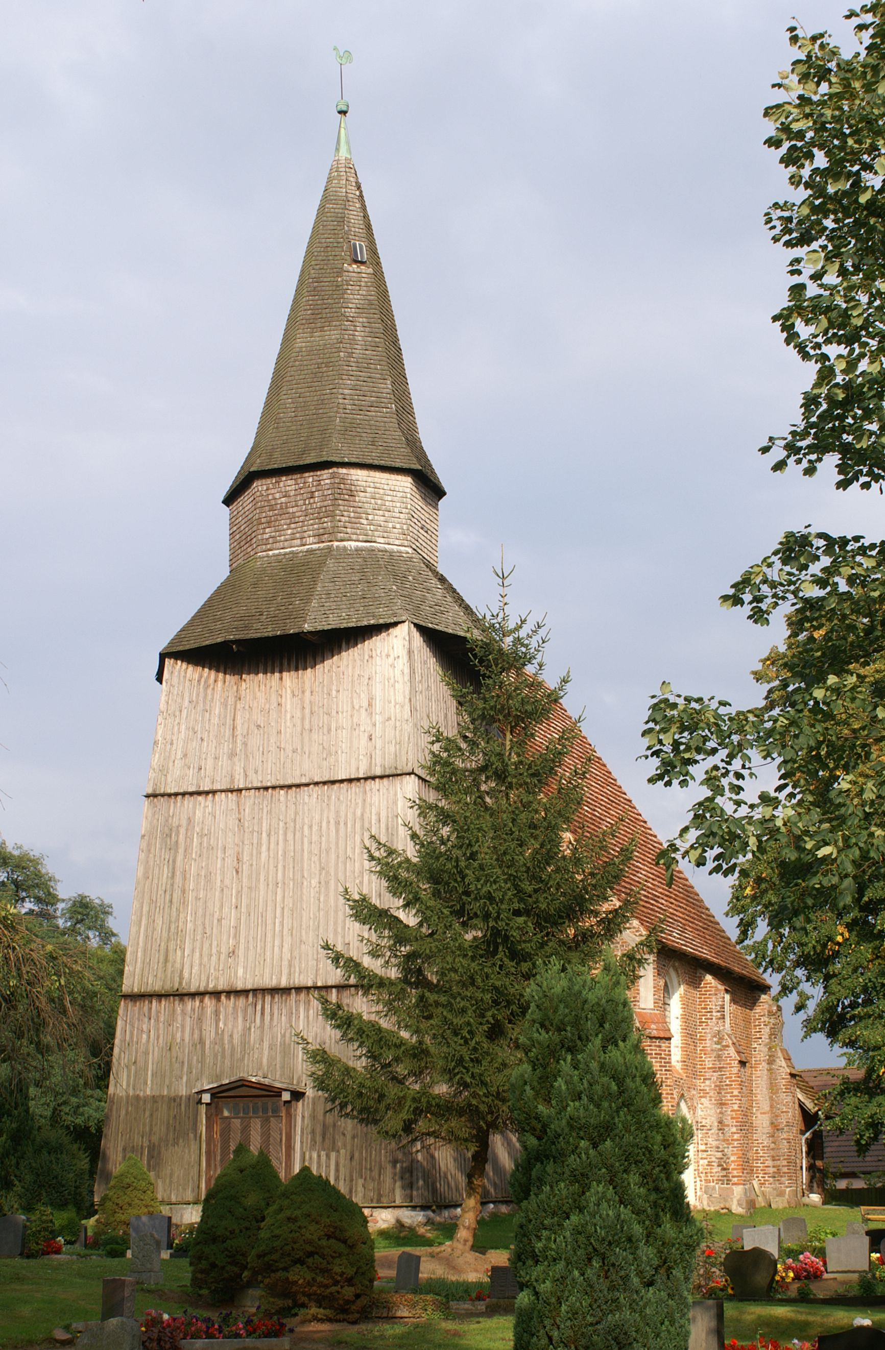 St.-Marien-Kirche in Neu Boltenhagen - Landkreis Ostvorpommern